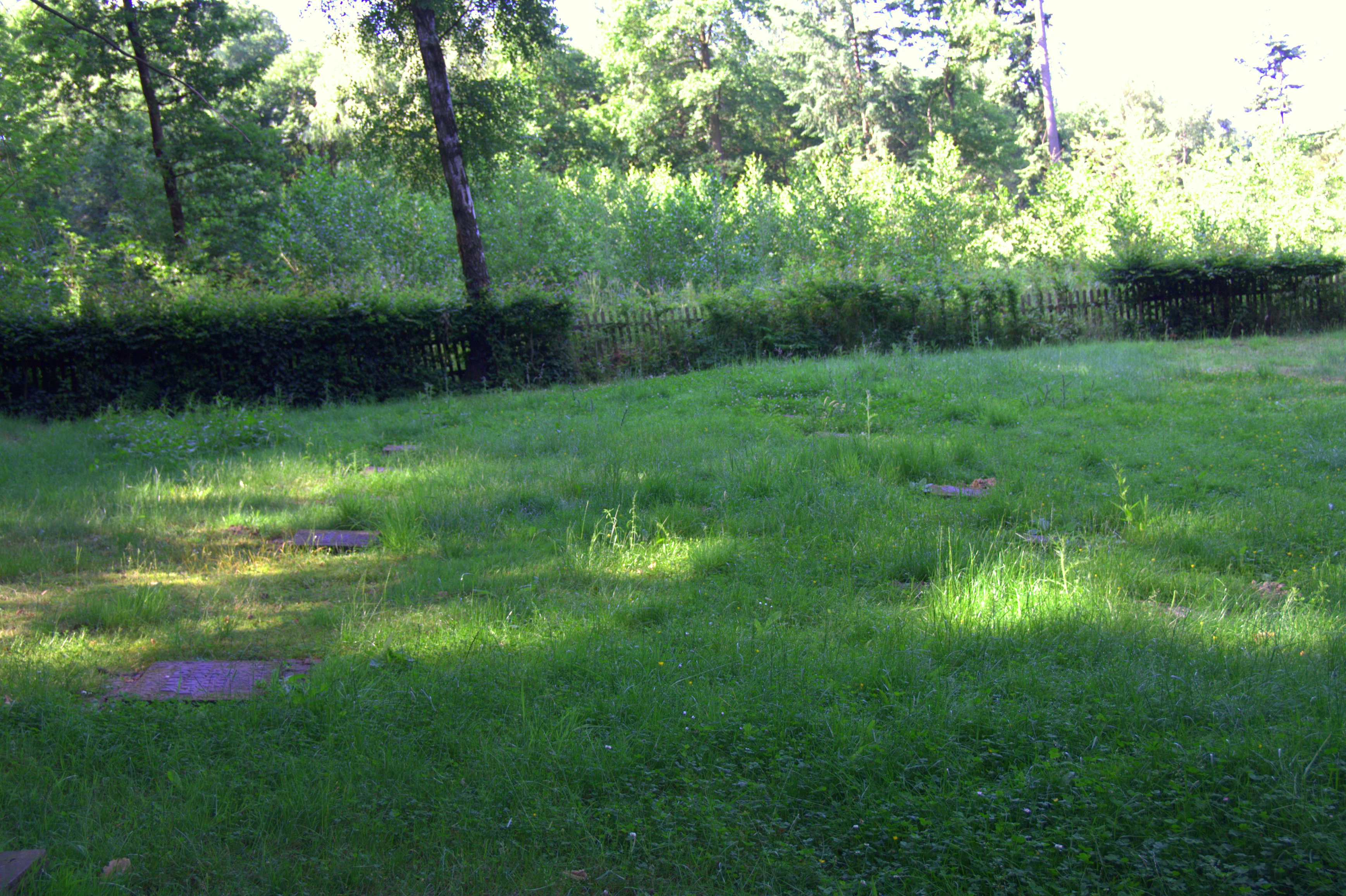 Blick auf den Gedenkort Waldfriedhof Trutzhain